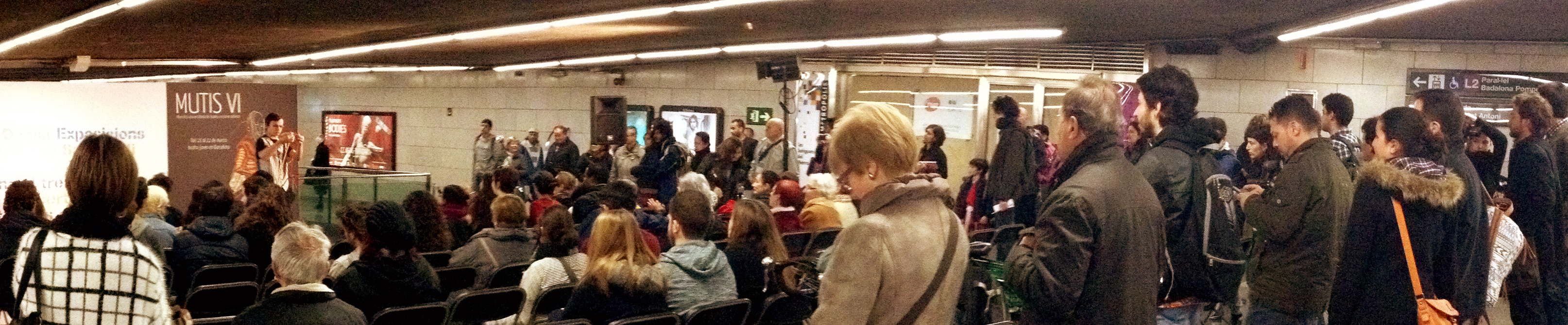 Espectáculo de magia en el Hall de la estación Universitat del Metro de Barcelona (TMB) en el marco del VI Festival MUTIS de teatro independiente de Barcelona.